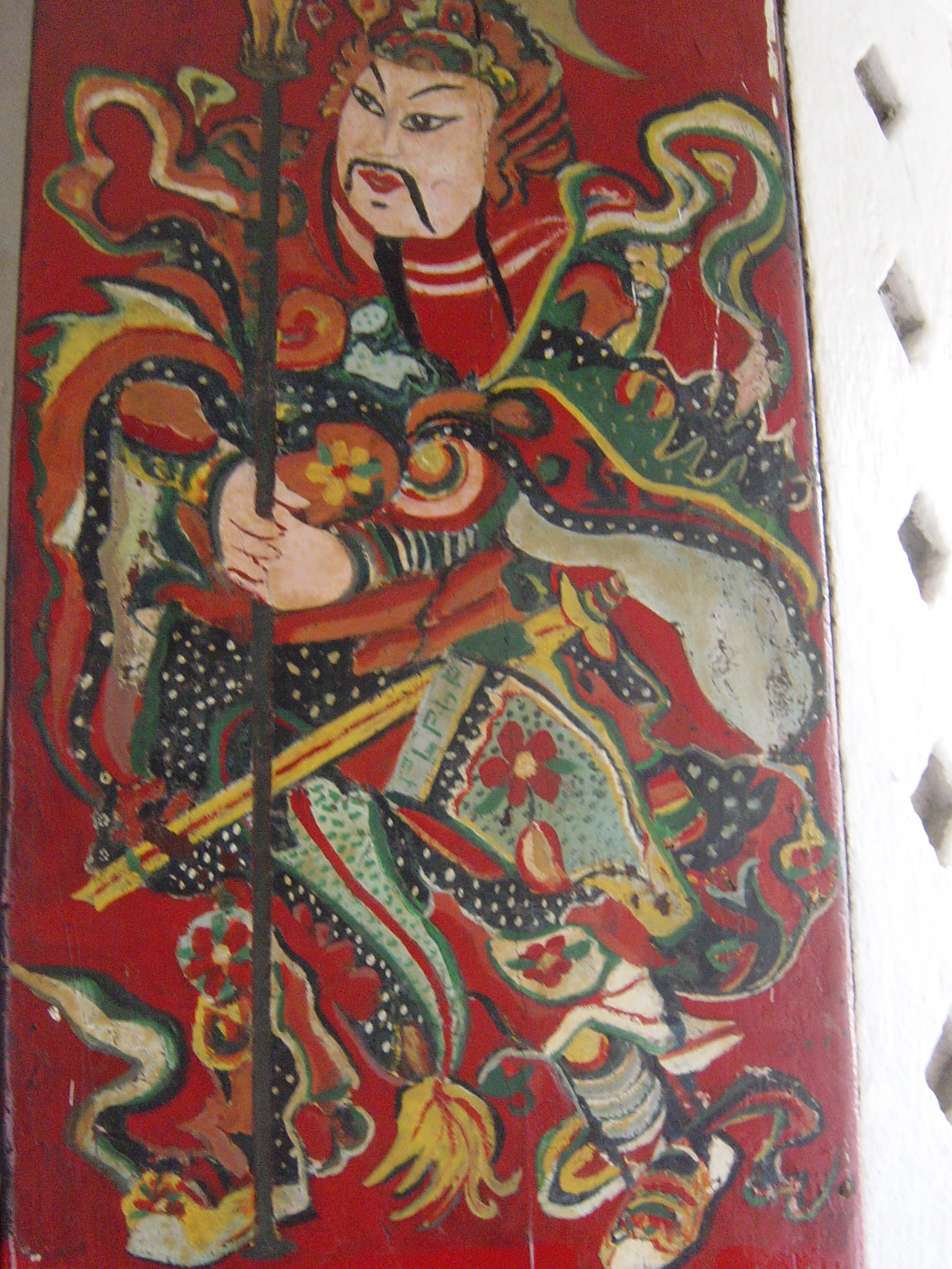 香港一天后古廟門上的右門神。Door God in Hong Kong.